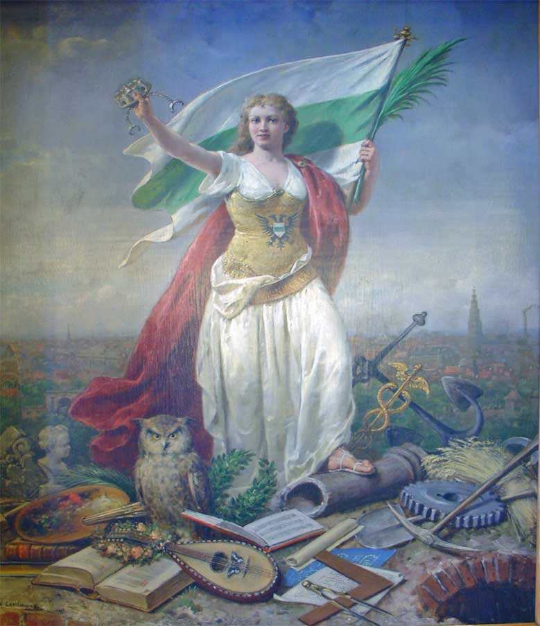 De stedenmaagd van Groningen (schilderij in het stadhuis van Groningen)